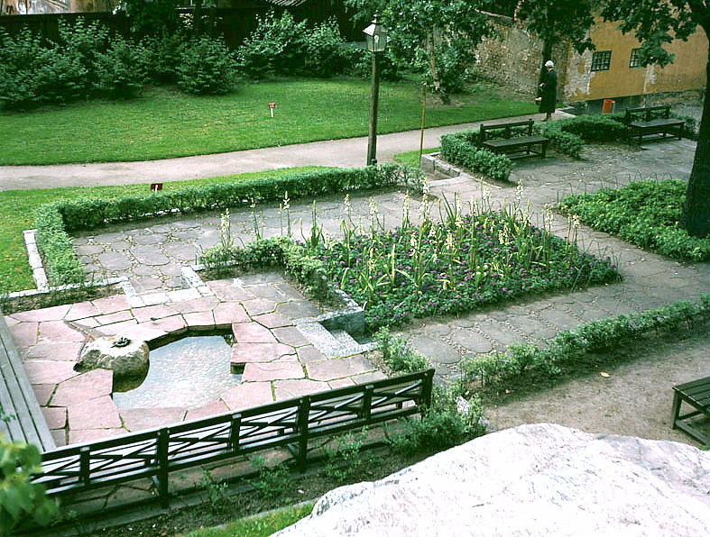 Liten park vid Glasbruksklippan, nuvarande Glasbrukstäppan.